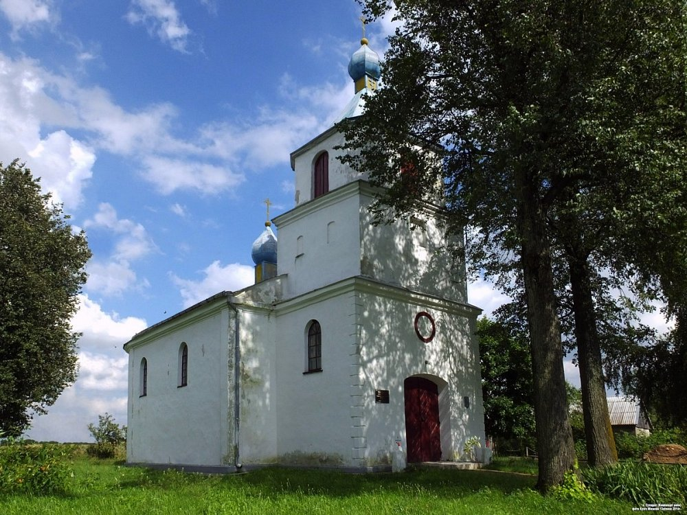 Сухадол. Свята-Варварынская царква